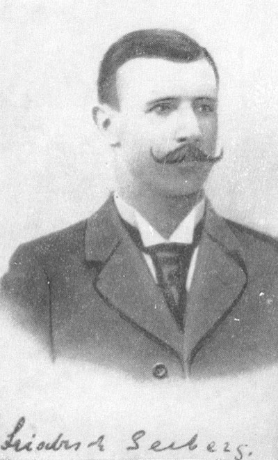 Ritratto di Fridrich Georgievič Zeeberg